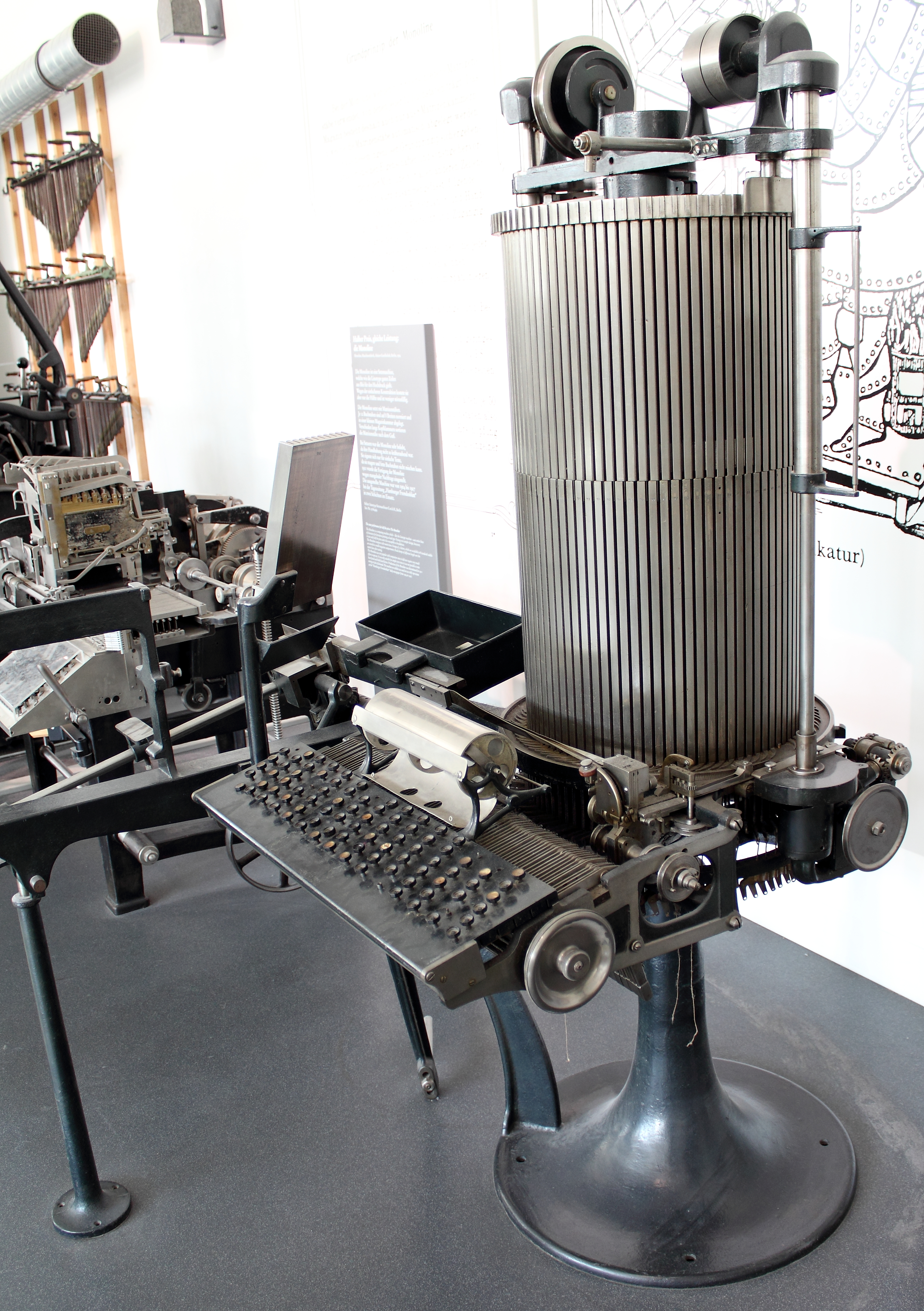 Thorne settemaskin fra ca 1890, står i Deutsches Museum, München